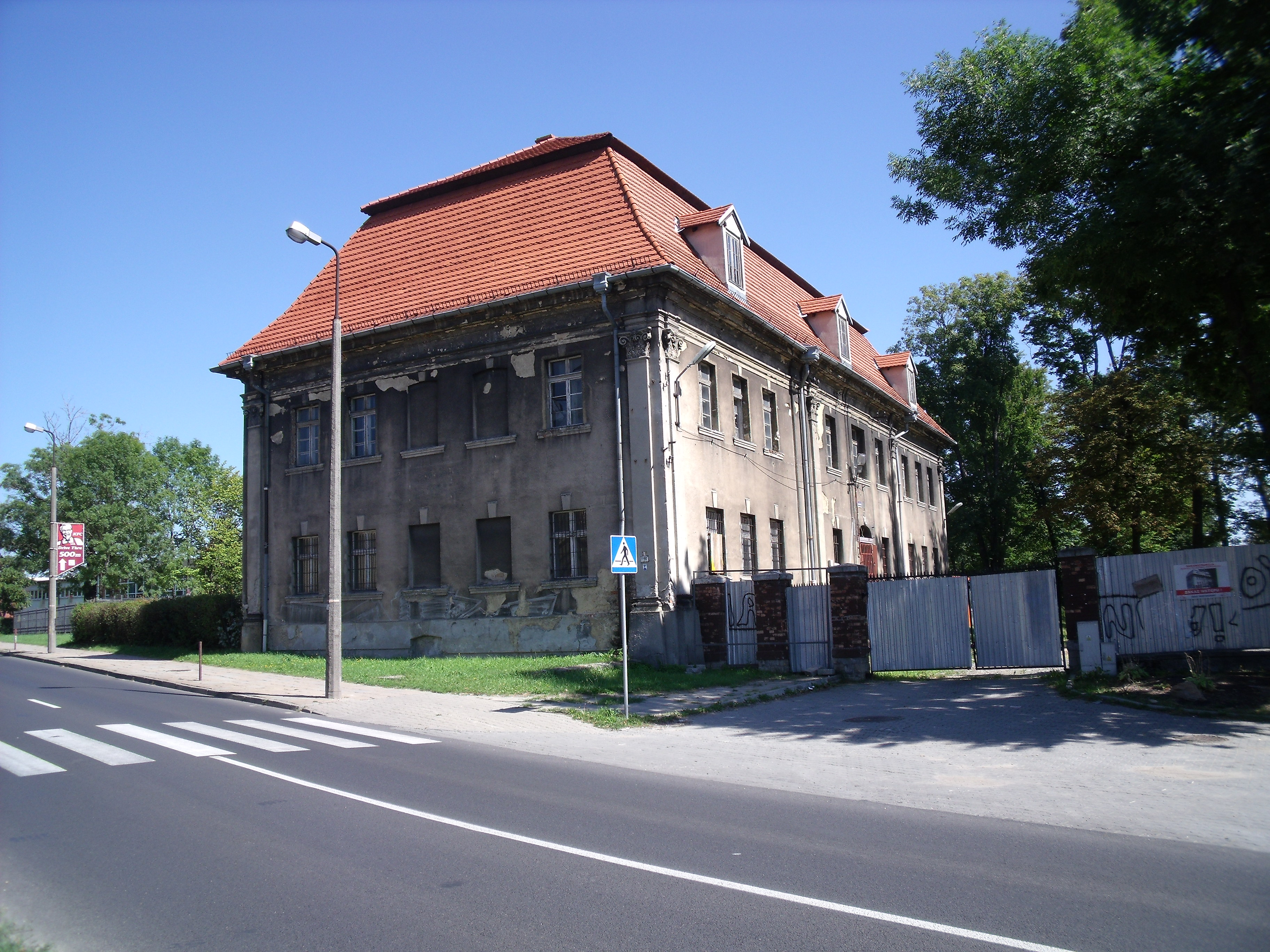 Zespół pałacowy.